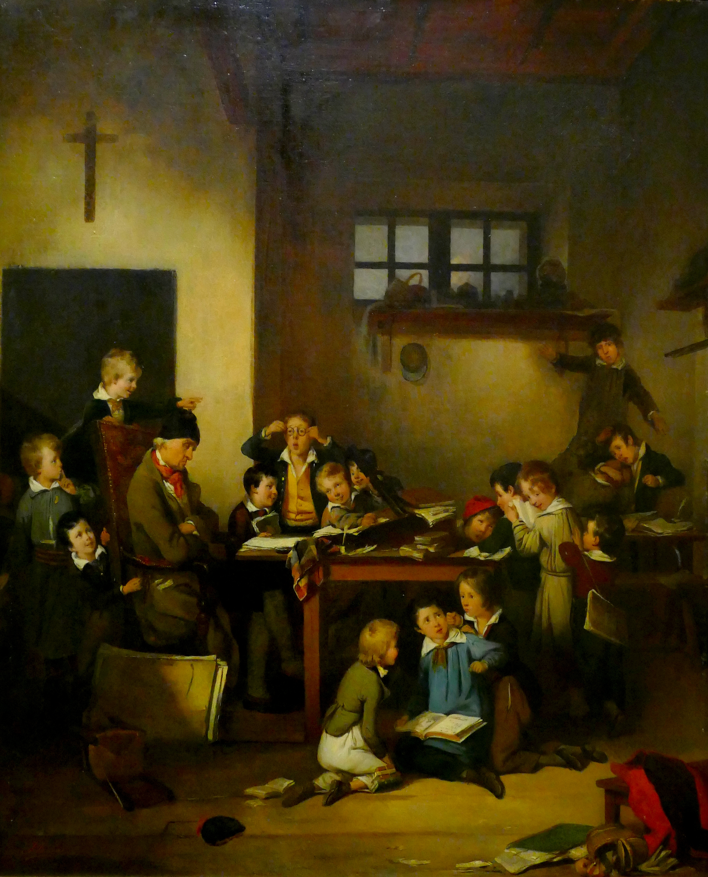 Le Maître d'école endormi huile sur toile de Joseph Beaume, 1831. Collections du musée national de l'éducation, Rouen.